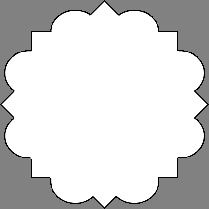 ഇസ്ലാമികവാസ്തുകലയിലെ എട്ട് മട്ടകോണുകളും, എട്ട് ചാപങ്ങളും ചേർന്ന മിനാറുകളുടെ അസ്തിവാരരൂപരേഖ. ഇത്തരത്തിലുള്ള വാസ്തുവിദ്യയാണ് ഖുത്ബ് മിനാറിന്റെ കാര്യത്തിലും ഉപയോഗിച്ചിരിക്കുന്നത്.